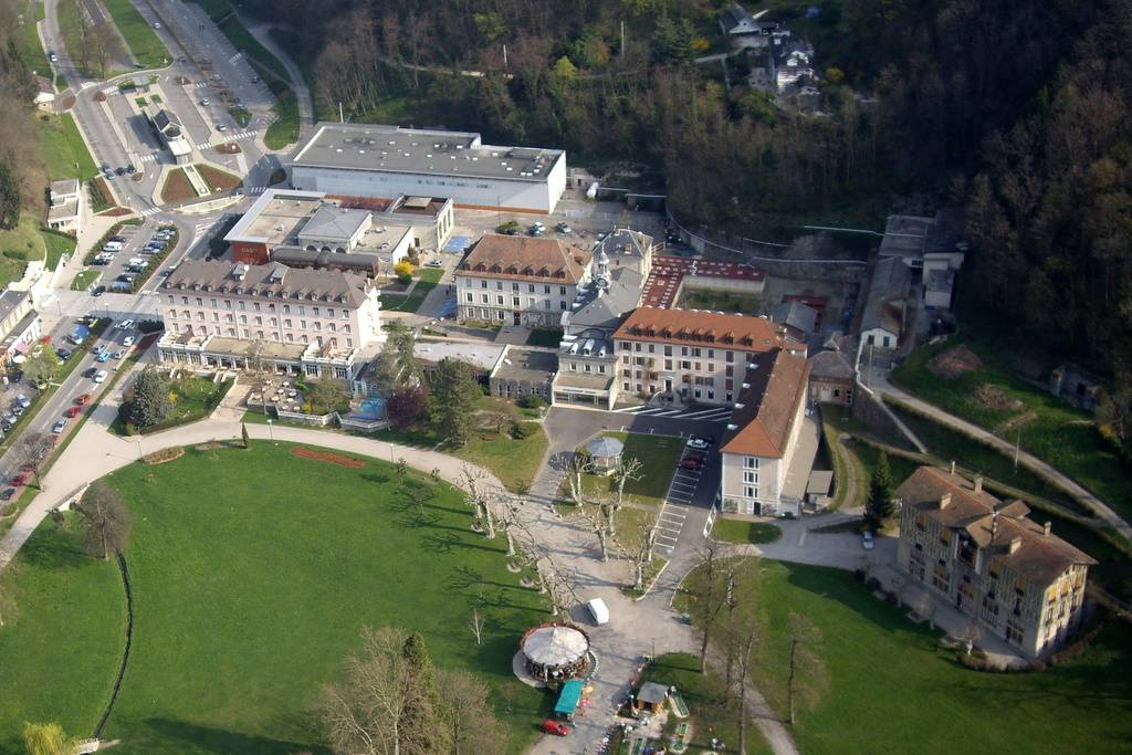 Photographie aerienne de Uriage, France